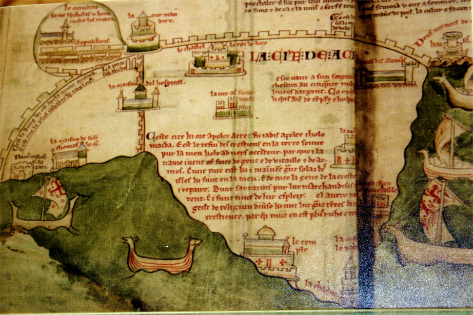 Akkon